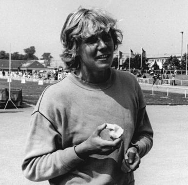 Anke Vater und Sabine Pätz ADN-ZB Bartocha 22.5.83 Neubrandenburg: DDR-Meisterschaften im Leichtathletik-Mehrkampf - Mit sehr guten 6515 Punkten verteidigte die Neubrandenburgerin Anke Vater (l.) ihren Siebenkampf-Titel von 1982.Sie übertraf damit ihre persönliche Bestleistung um 126 Zähler und nimmt nun Platz fünf in der "Ewigen"" Weltbestenliste ein. Zweite wurde Sabine Pätz (SC DHfK Leipzig- r.) mit beachtlichen 6381 Punkten.